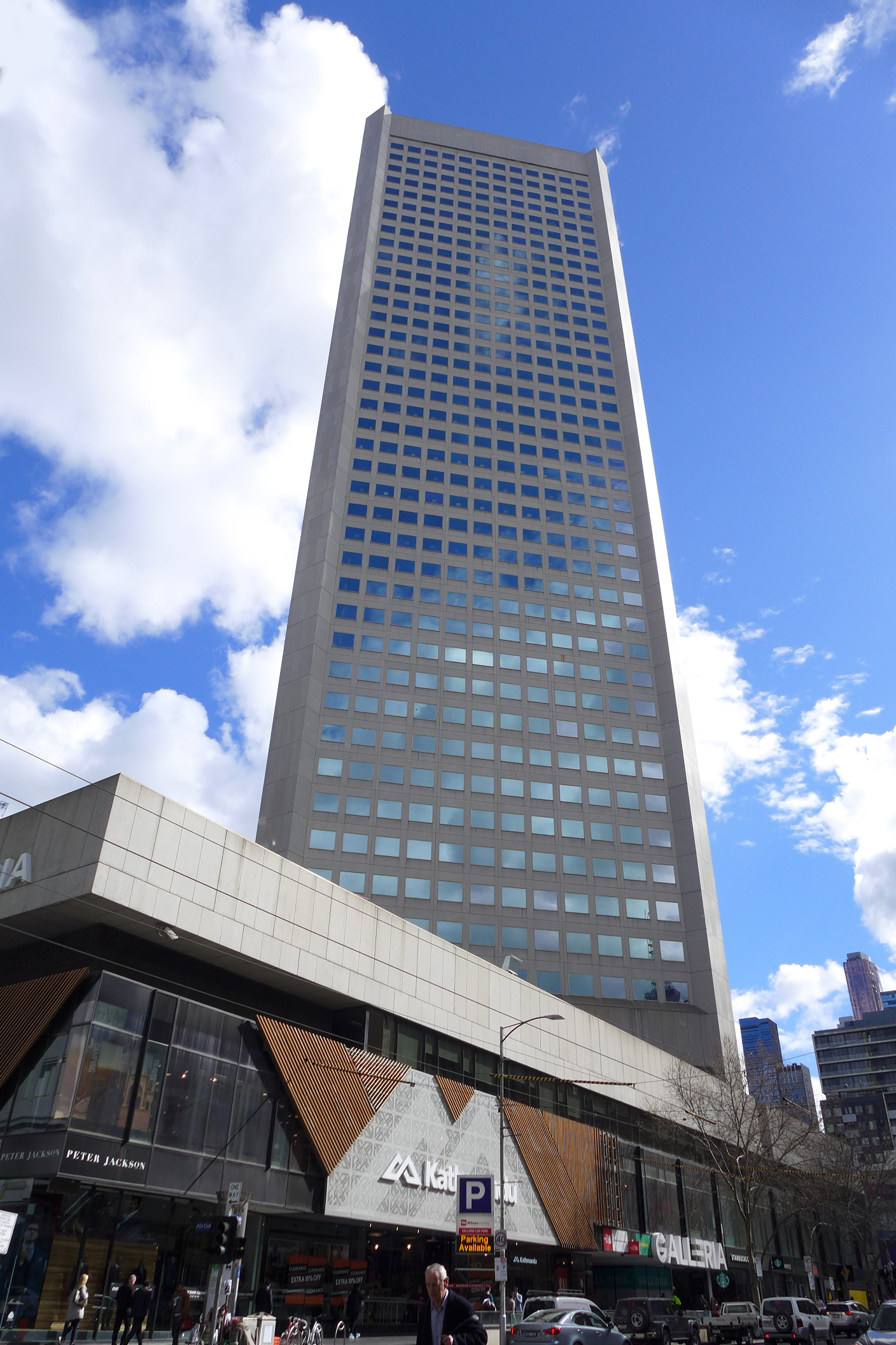 385 Bourke